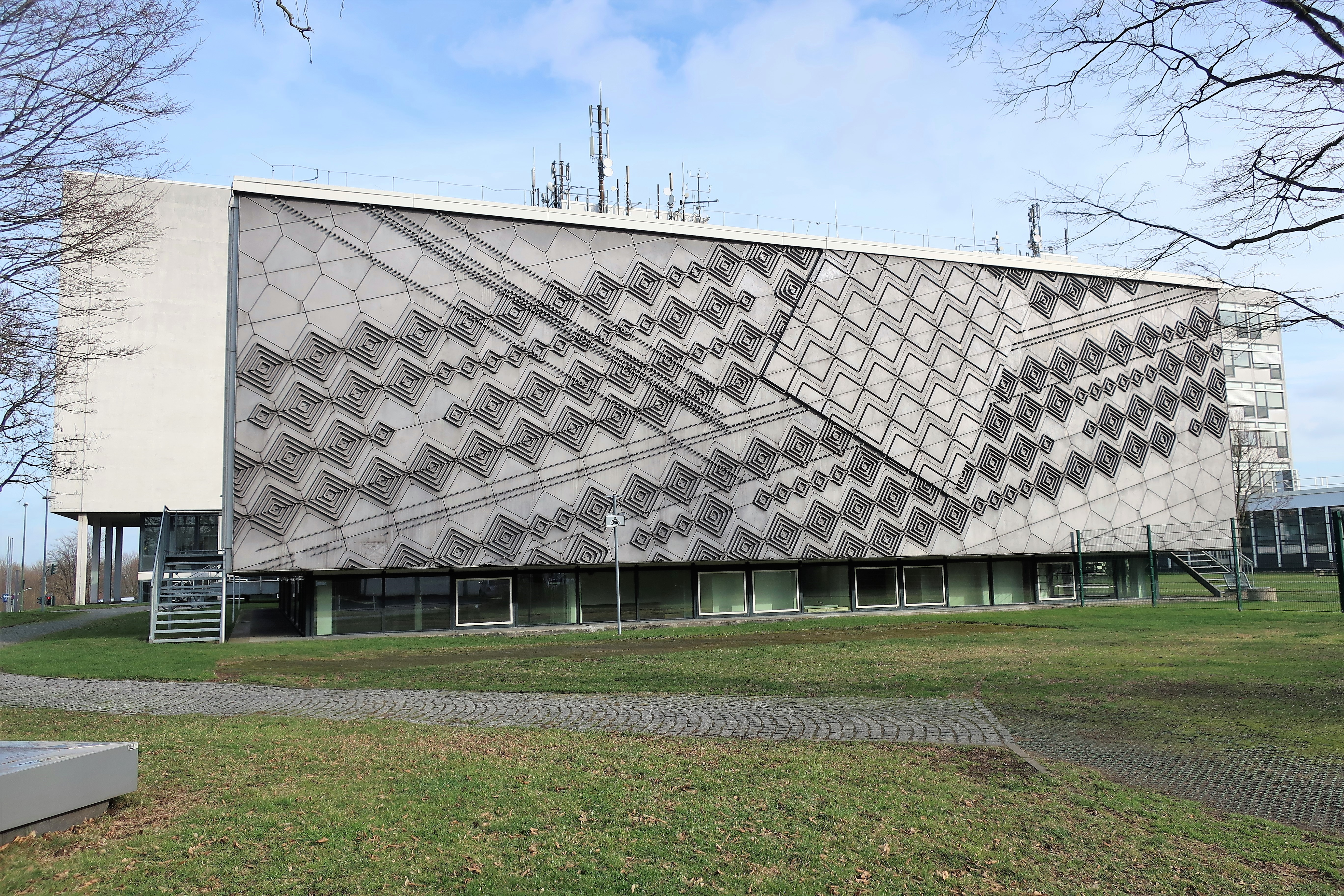 Fachhochschule Südwestfalen in Hagen, Haldener Straße 182. Wandgestaltung am großen Hörsaal aus Aluminiumguss 9 x 24 m von Rolf Crummenauer. Das Relief von 1964 zeichnet sich durch eine charakteristische Linienführung aus, die von links unten nach rechts oben verläuft. Die diagonale Reihung von Quadraten geht teilweise in eine wellenförmige Linie über. Es entsteht ein komplexes Gebilde aus geometrischen Formen. Blick von der Fliederstraße.